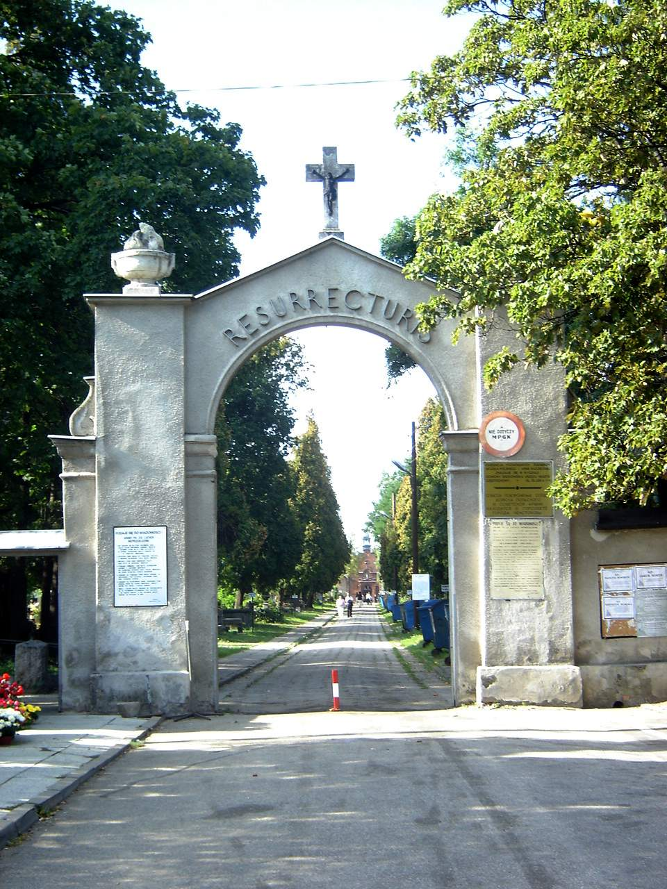 Częstochowa, Cmentarz Kule